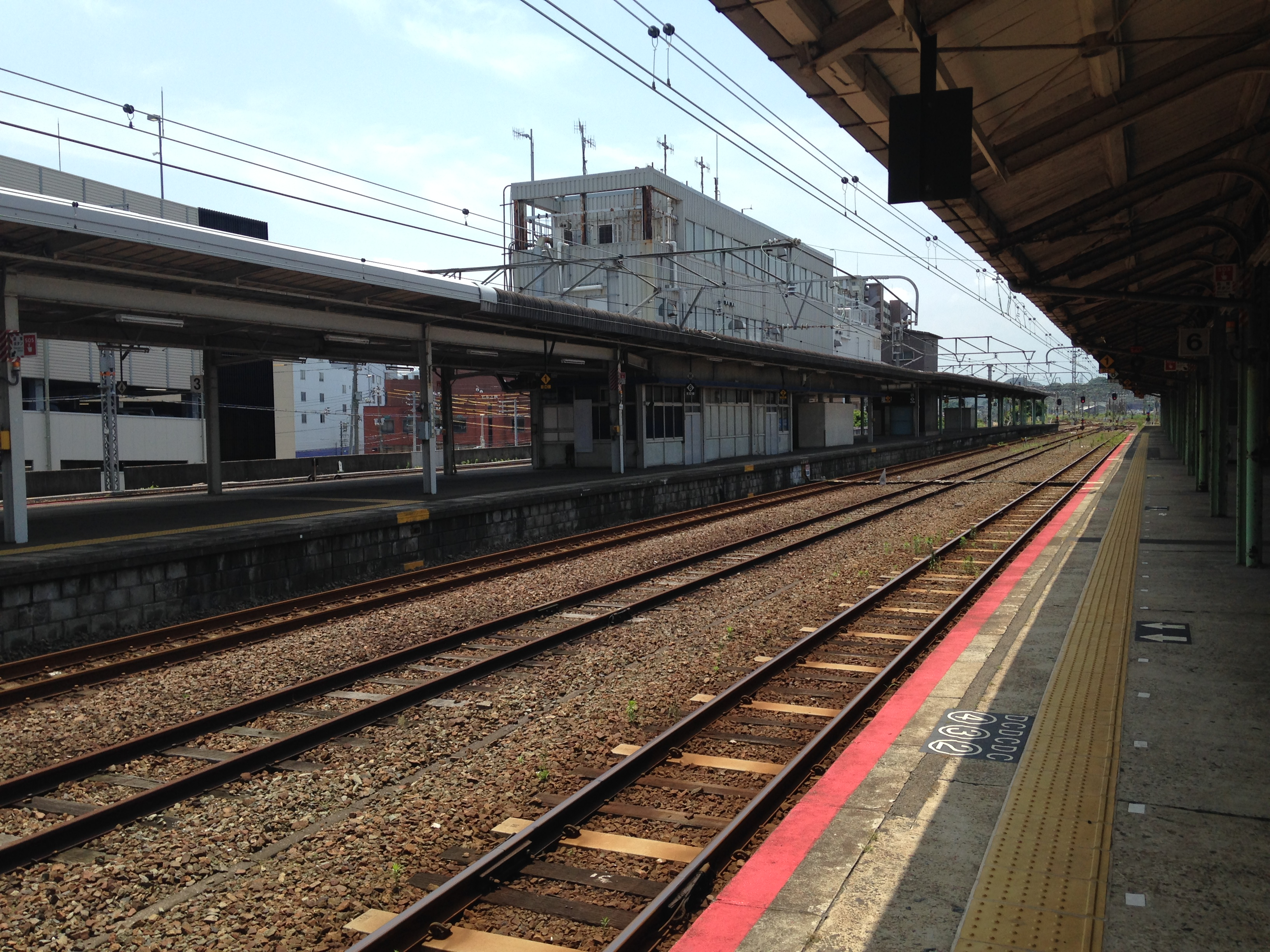 下関駅6番ホーム